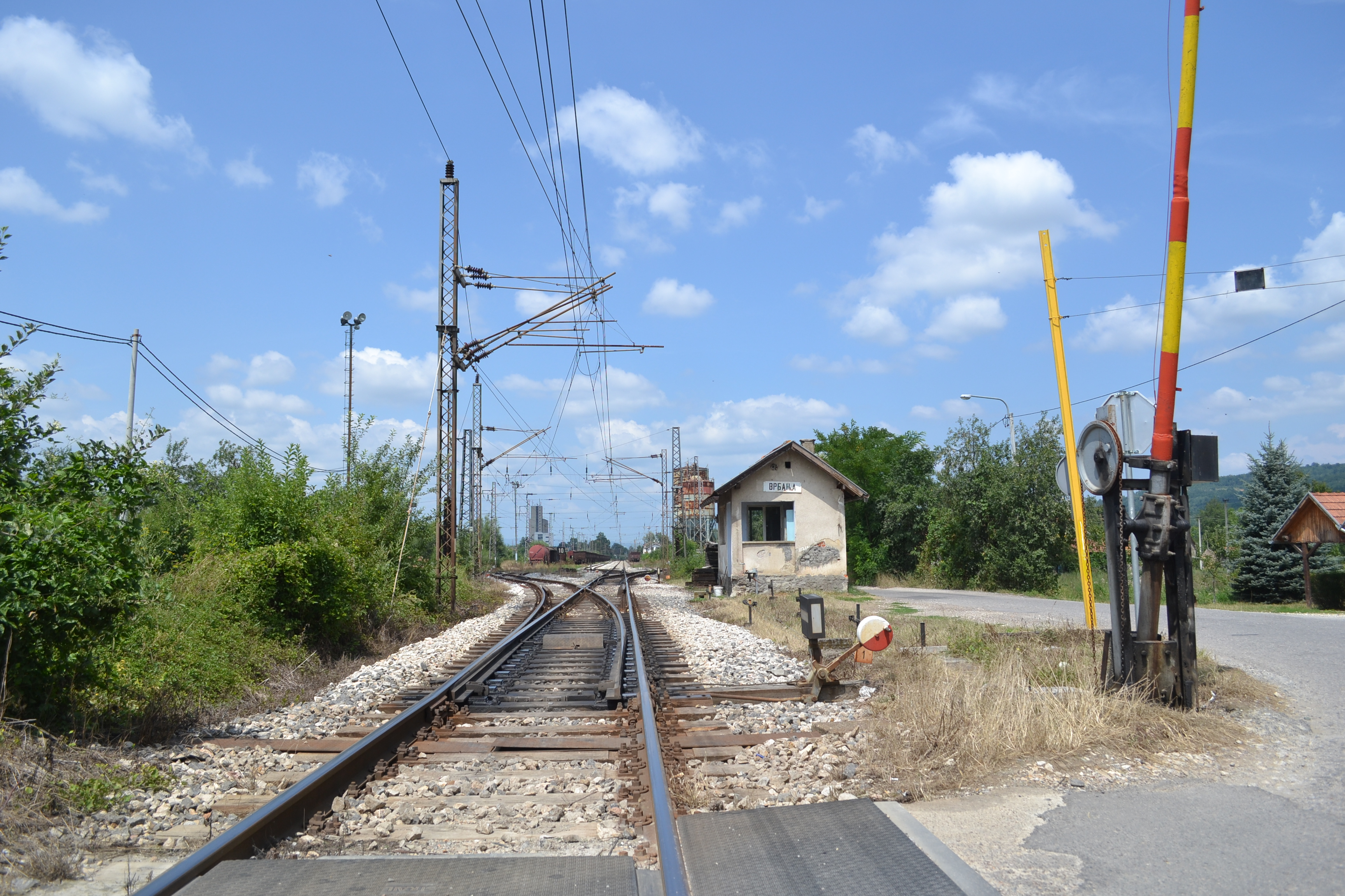 Бањалука: жељезничка станица у Врбањи